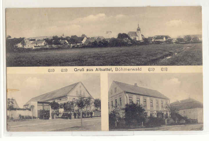 Ortsansicht von Altsattel, ehemaliger Bezirk Tachau im Egerland, heute Staré Sedlo u Tachova